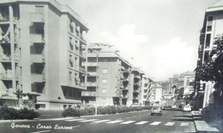 Genova, corso Europa nuova